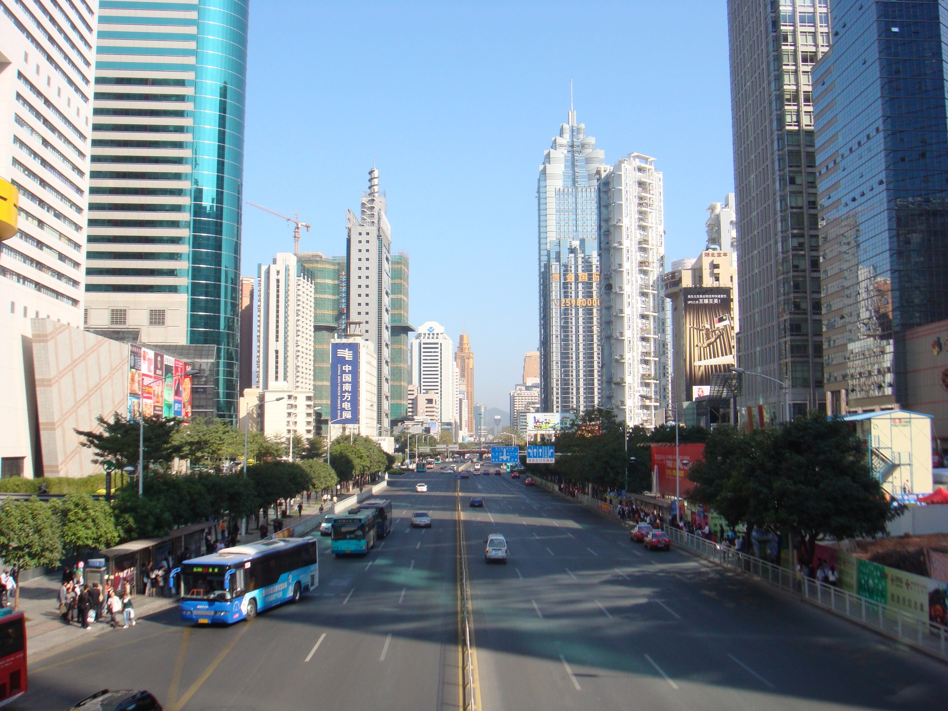 深南東路